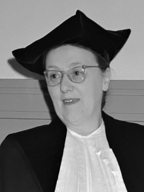 Inaugurale rede Mevrouw Dr. Christ. Mohrmann K. U. Nijmegen 23 januari 1953